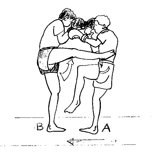 stick-kick4.jpg